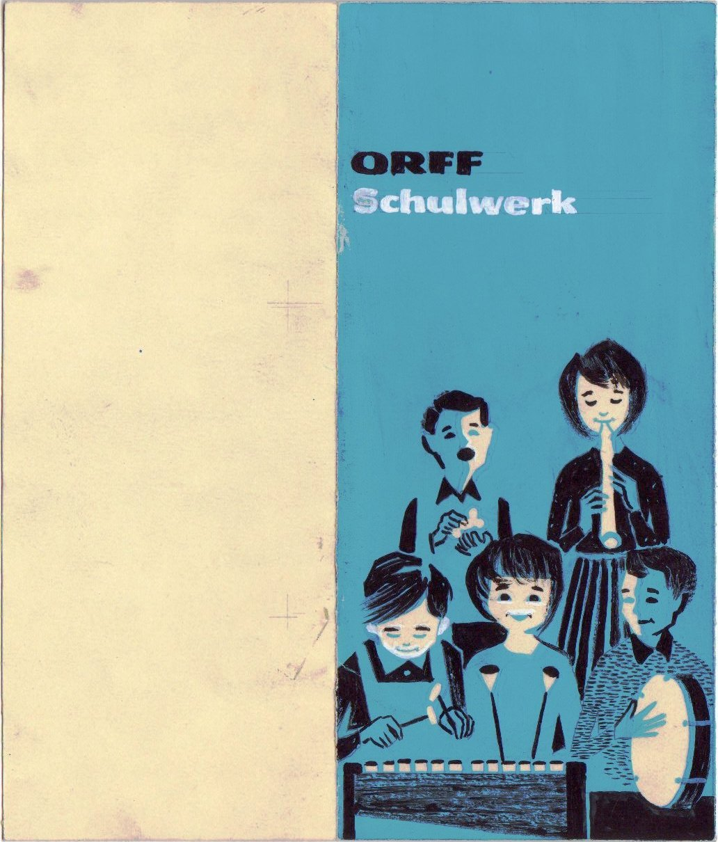 Entwurf Heinz Traimer für das Orff Schulwerk. Kleine Kinder haben Instrumente in der Hand.